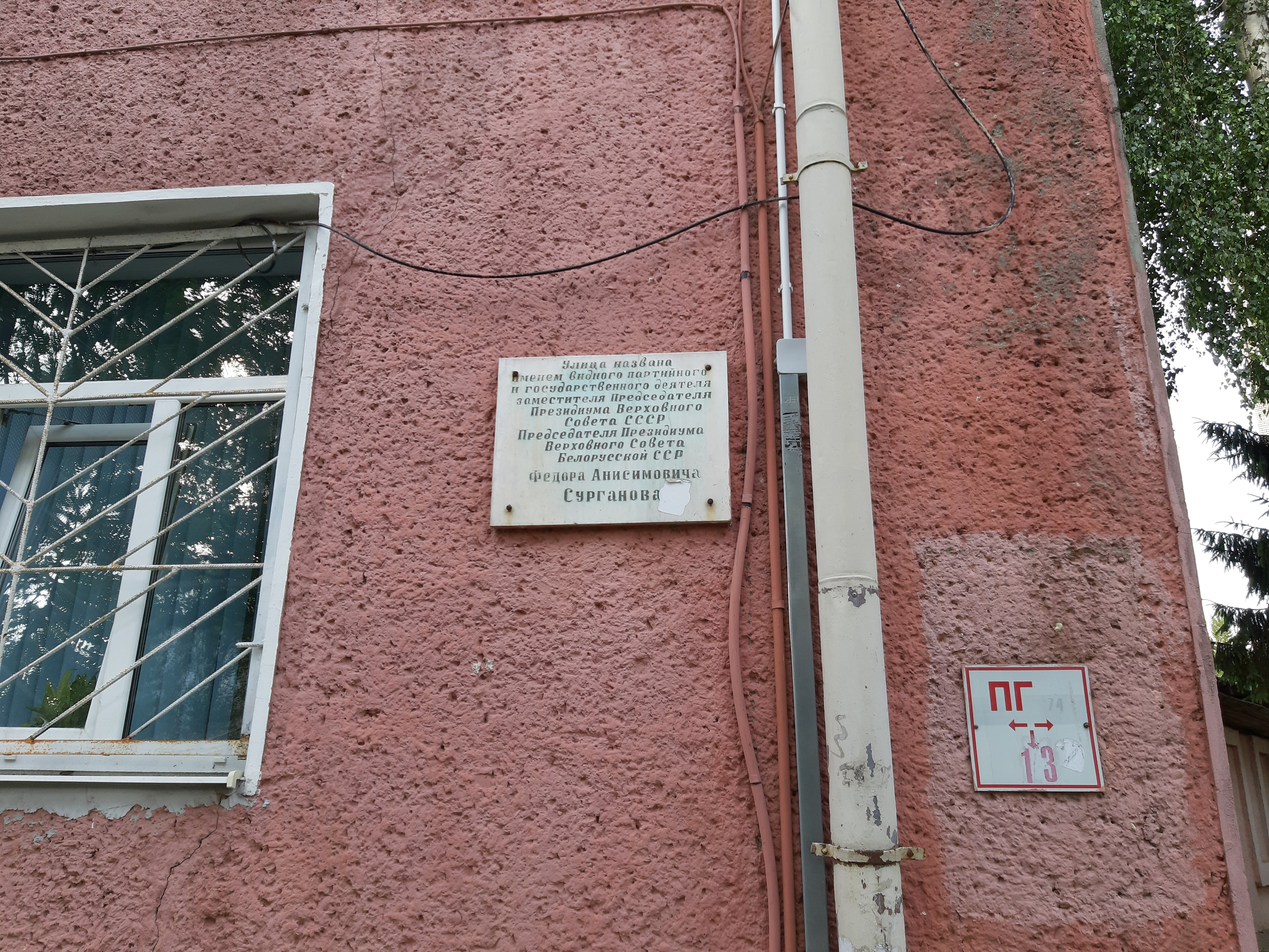 Магілёў. Вуліца Сурганава